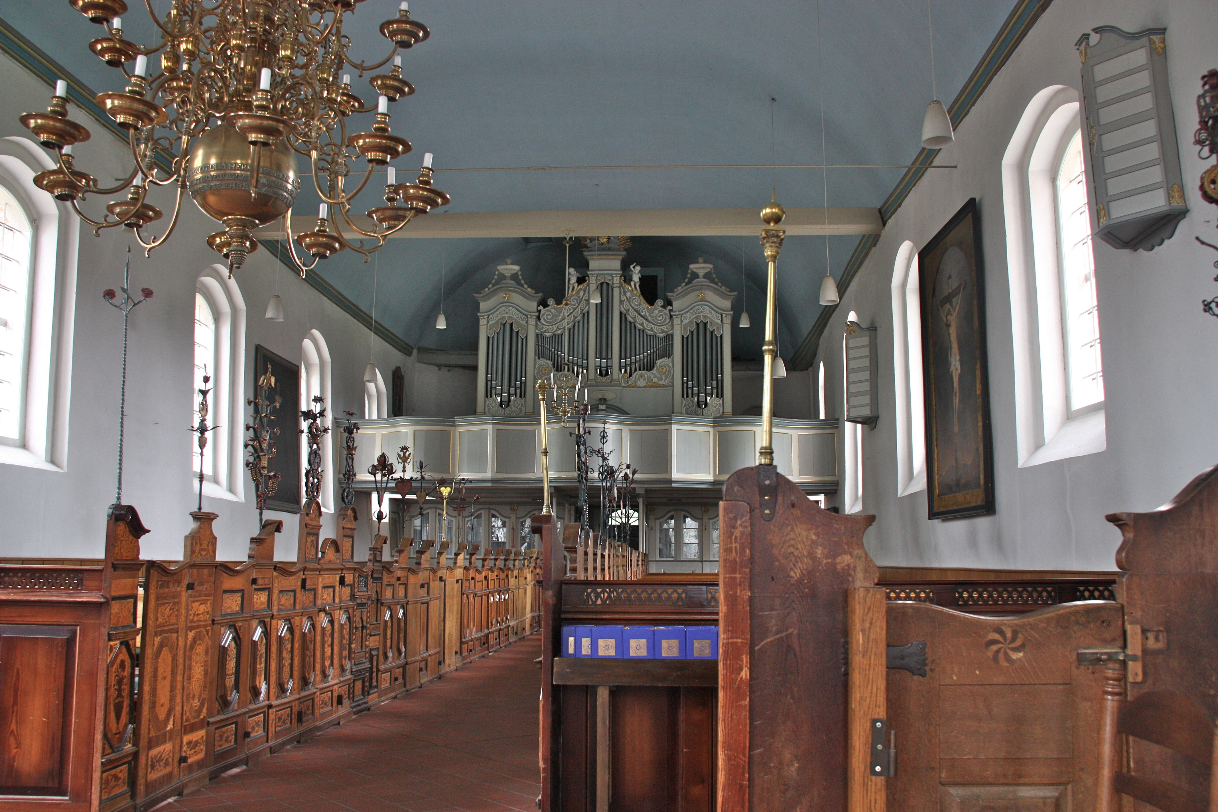 Sankt Johannis, Hamburg-Neuengamme, Innenansicht in Richtung OrgelThis is a photograph of an architectural monument.